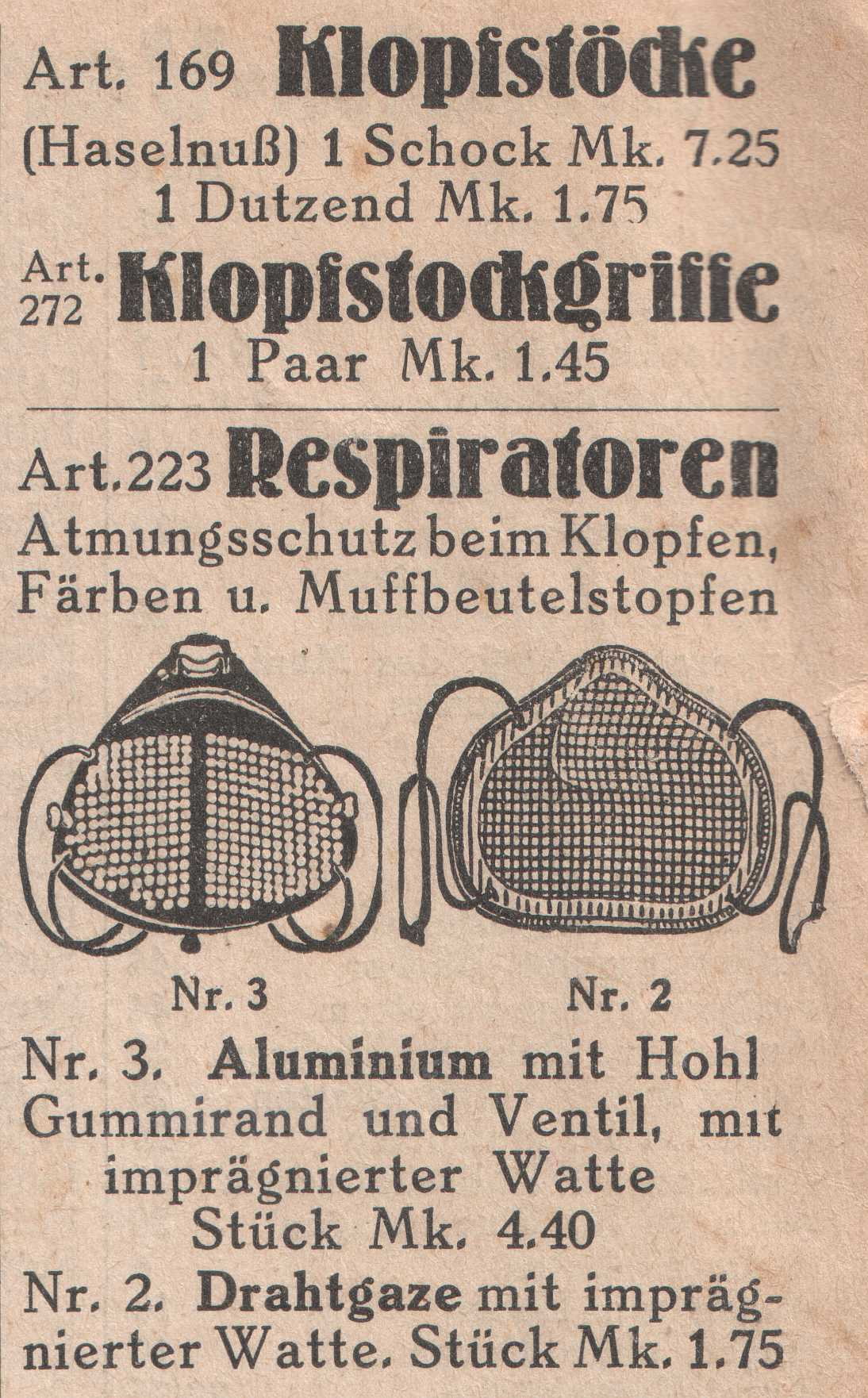 Anzeige aus einer Zutaten-Preisliste der Firma Hausding & Bergmann, Pirna/Sachsen. Preisliste Nr. 42, ausgegeben am 10. September 1936